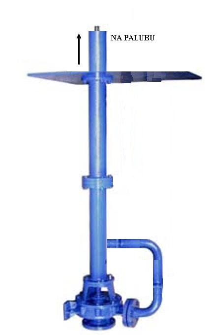 design of tanker submerged pump